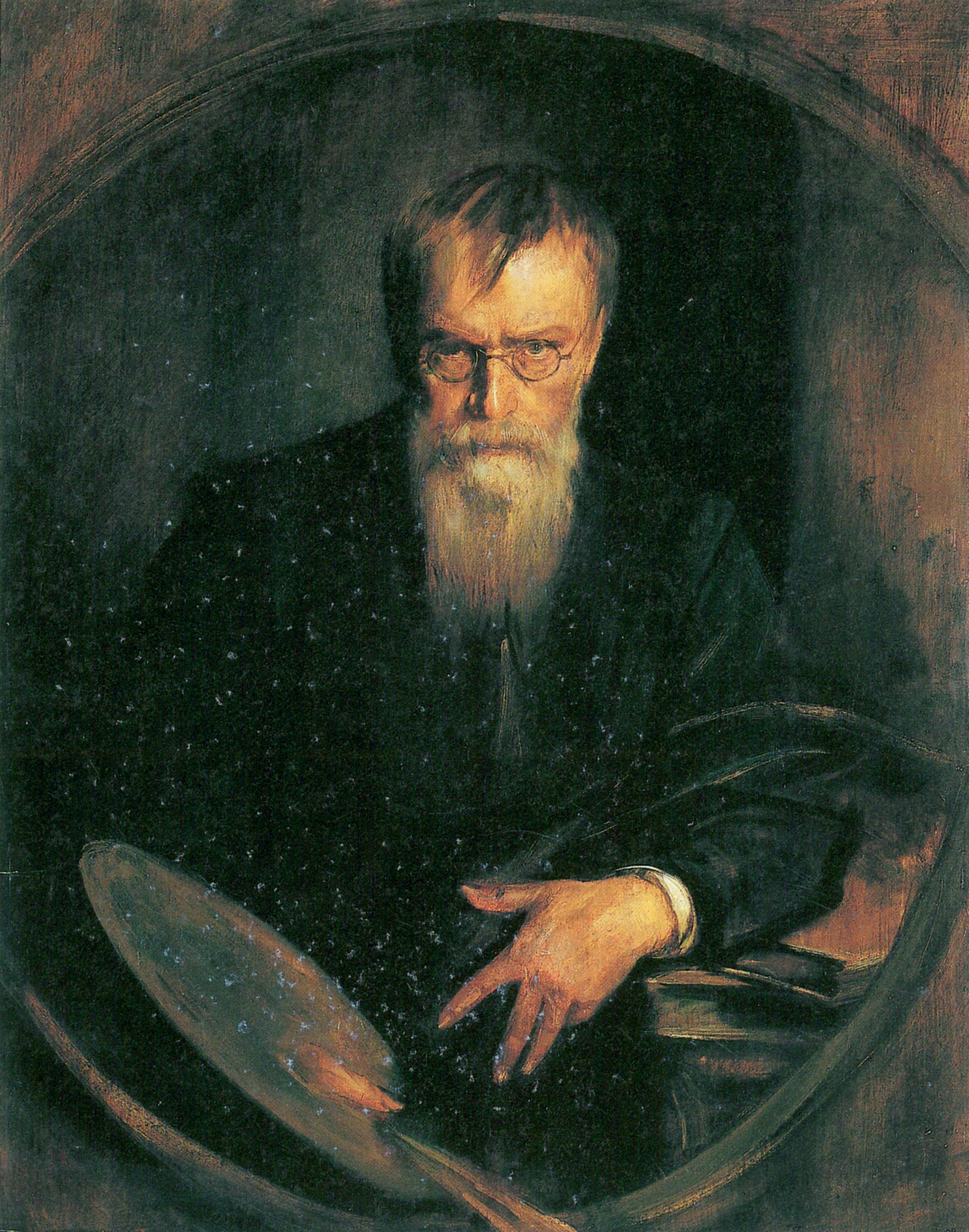 Self-portrait